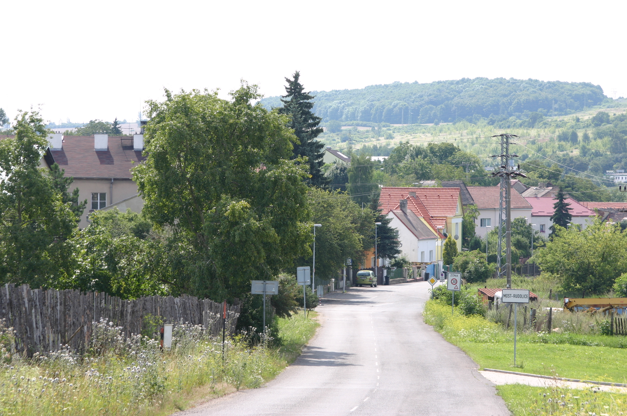 Osada Rudolice u Mostu v okrese Most.